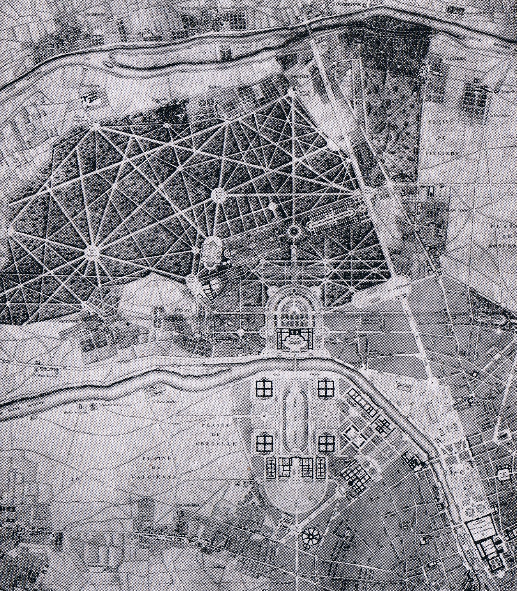 Carte présentant le palais du Roi de Rome et ses alentours (Champs de Mars, Bois de Boulogne, villages de Chaillot et Passy)